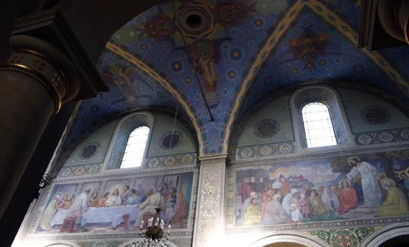 Polska